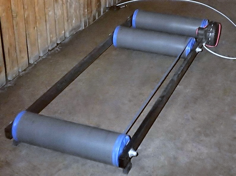 Freie Rolle mit Bremsvorrichtung (durch Aushängen des roten Keilriemens deaktiviert); Eigenfotografie